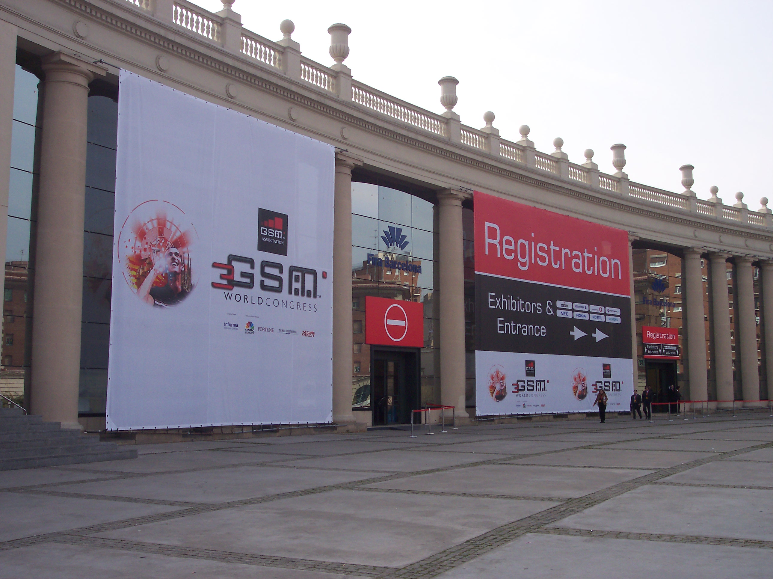 Fira de Barcelona